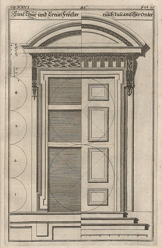 Original image description from the Deutsche Fotothek Architektur & Bauwesen & Tür & Fenster & toskanische Ordnung